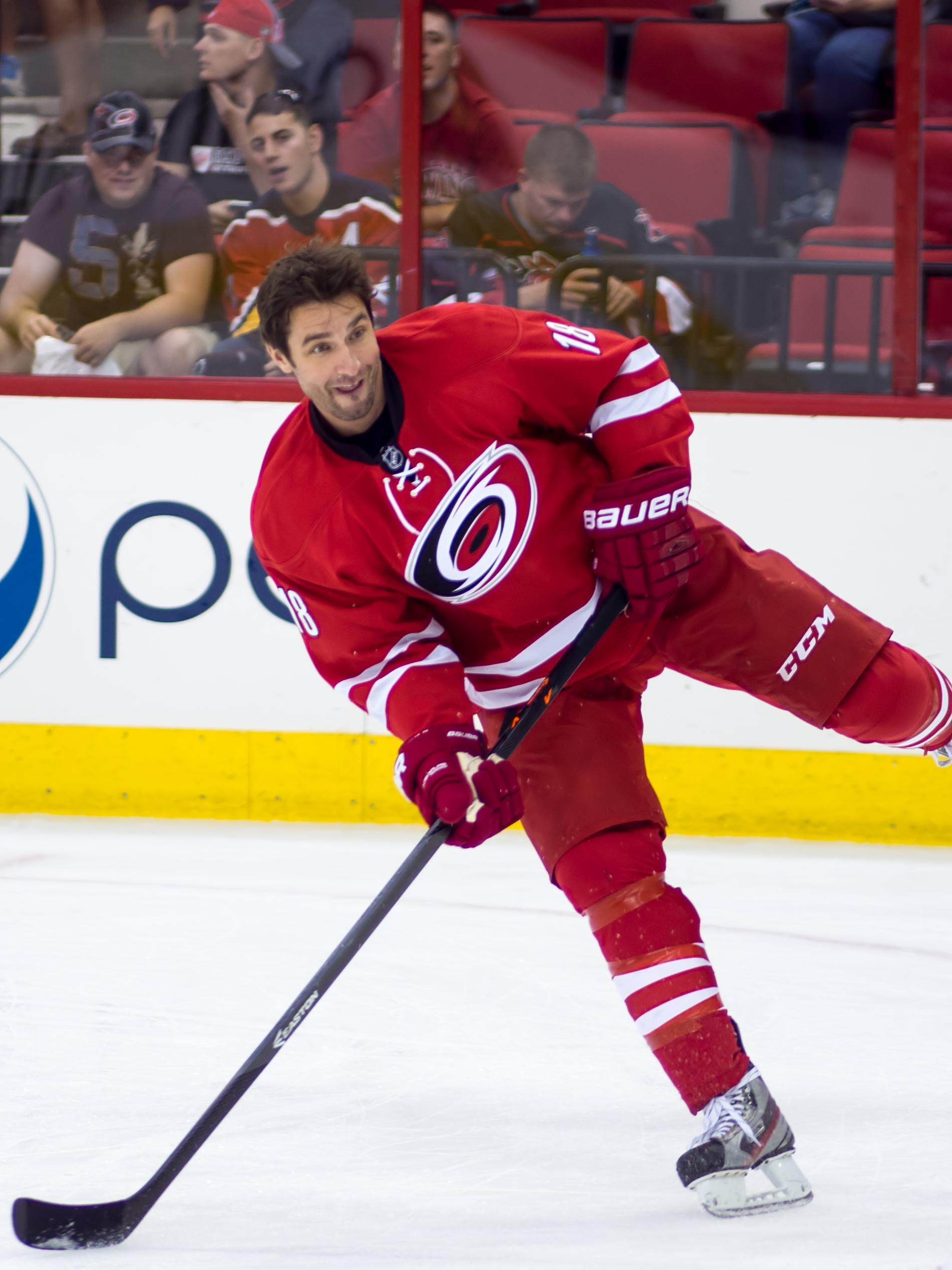 Radek Dvořák, Czech ice hockey player